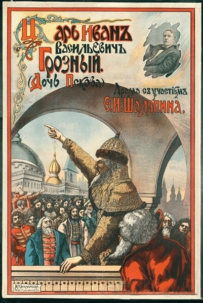 Кальмансон М.С. Плакат к кинофильму "Царь Иван Васильевич Грозный". 1915. Типография И.С. Фуки Москва. Хромолитография. Фильм по драме Льва Мея «Псковитянка» производства товарищества «Шарез», режиссер Александр Иванов-Гай. Премьерный показ картины 20.10.1915